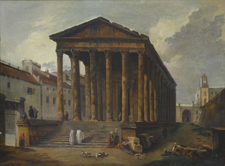 vue réaliste